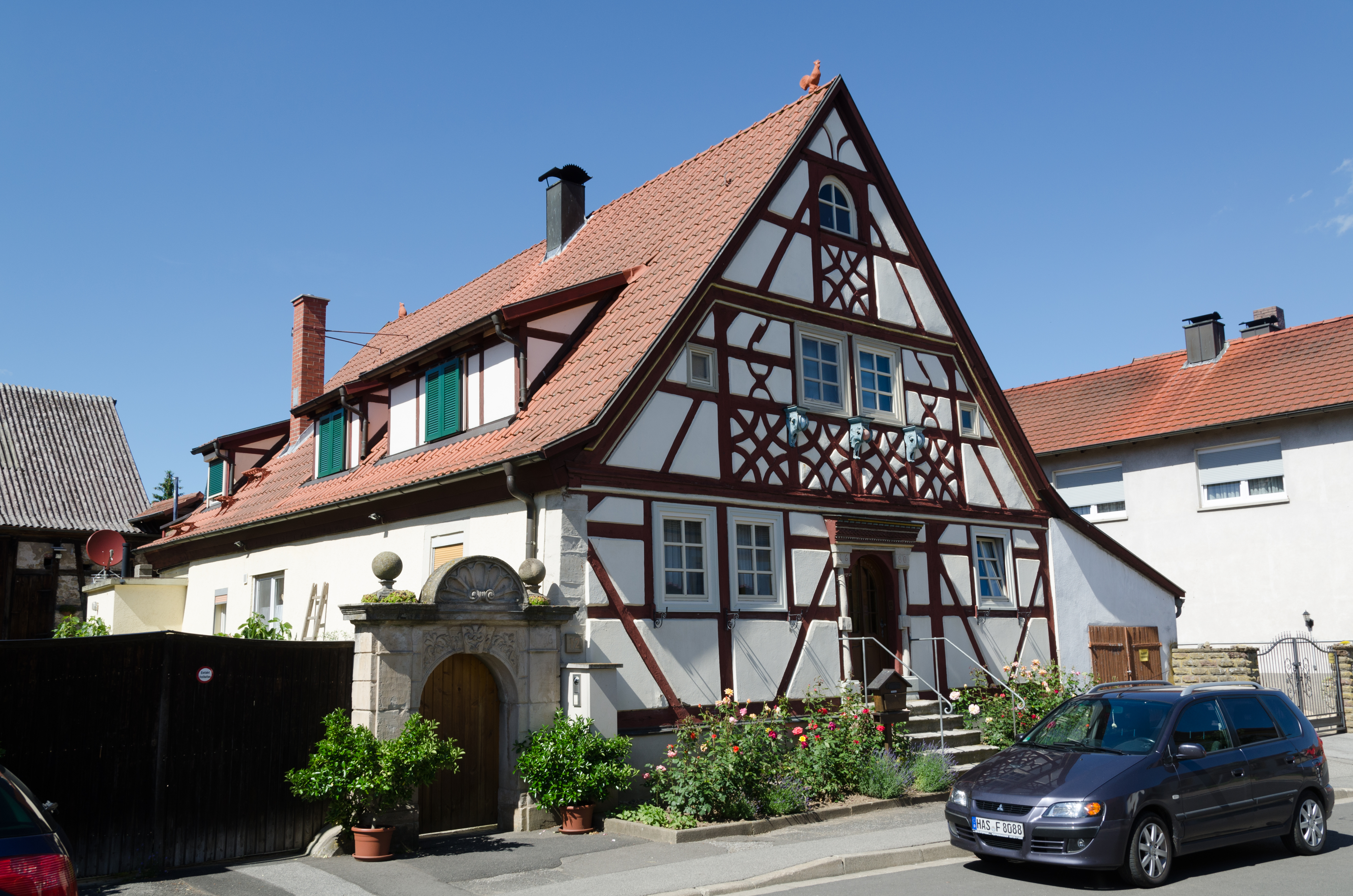 Obertheres, Klosterstraße 12